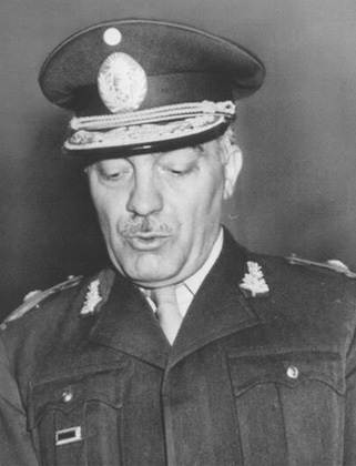 Raúl Poggi, cuando era General de Brigada en 1959.